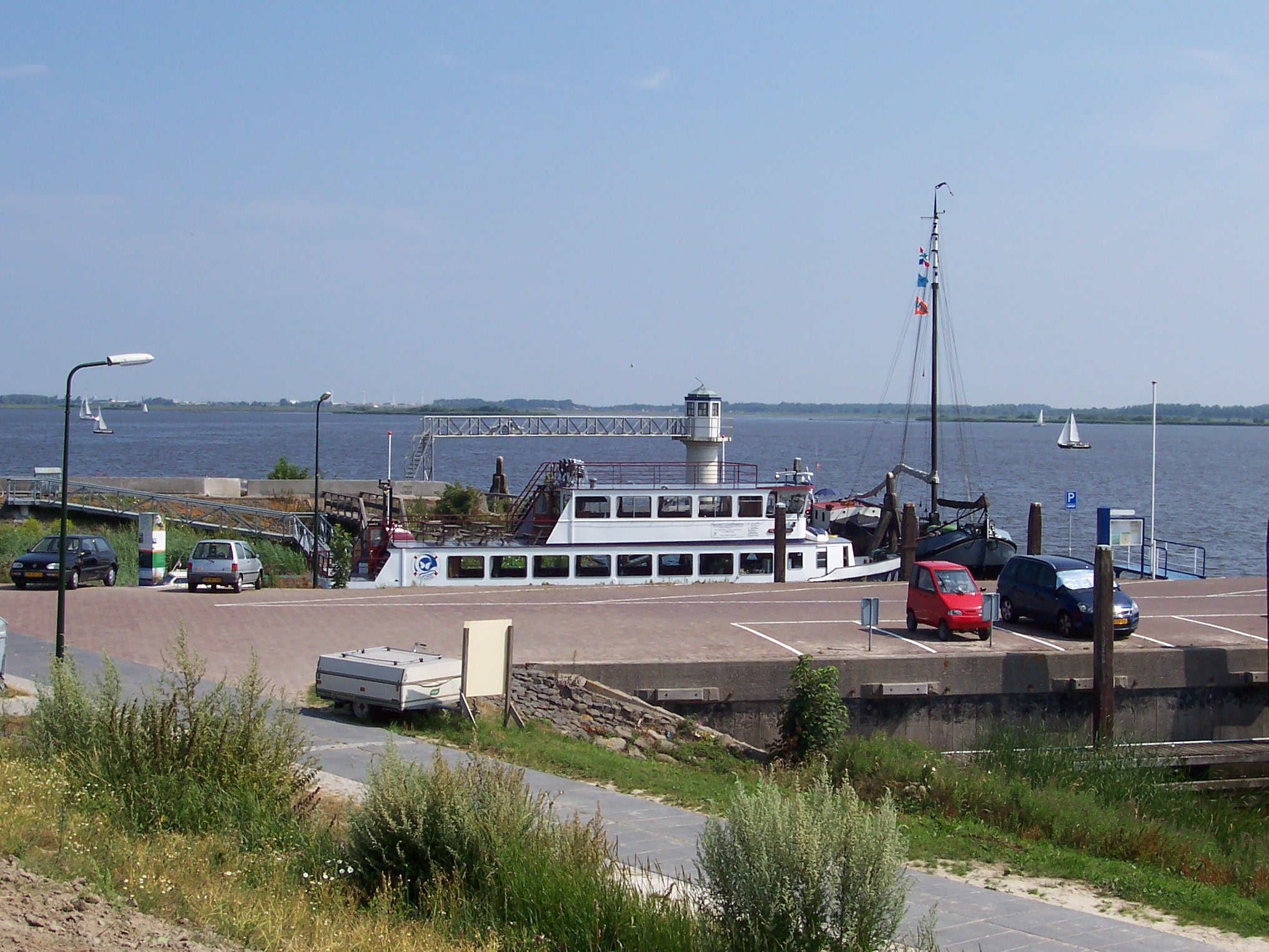 Der Hafen Oostmahorns am Lauwersmeer